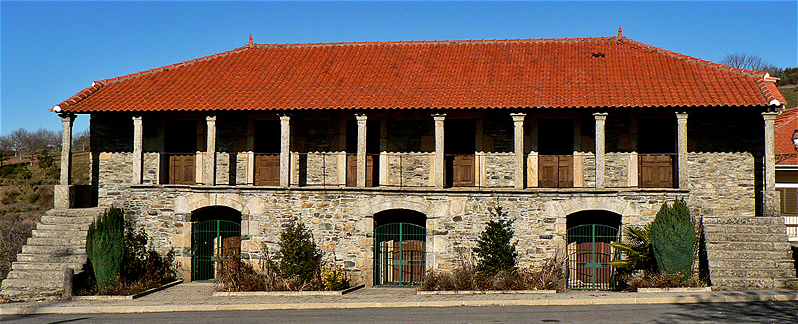 "Casa da Santa", Tuizelo.